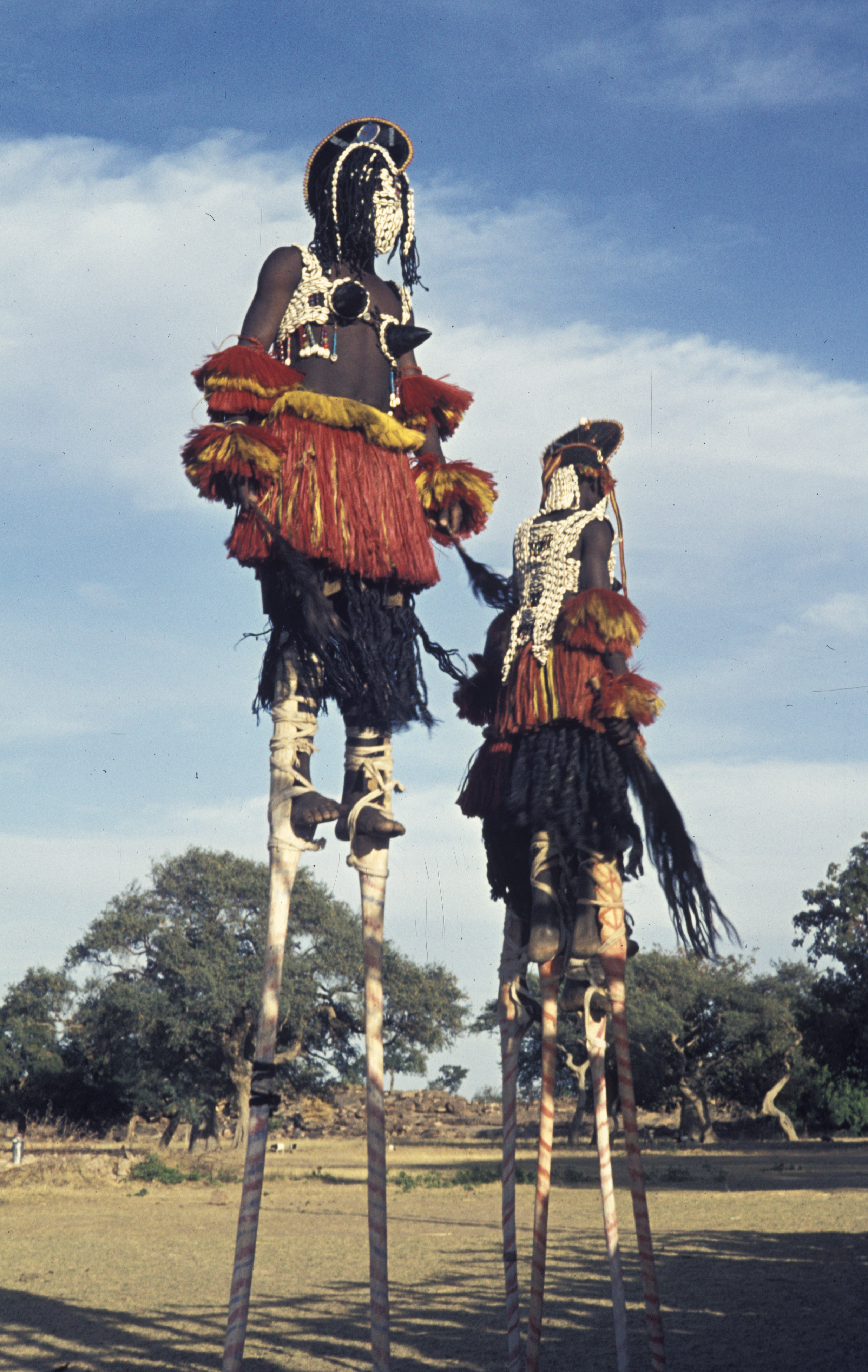 Mali